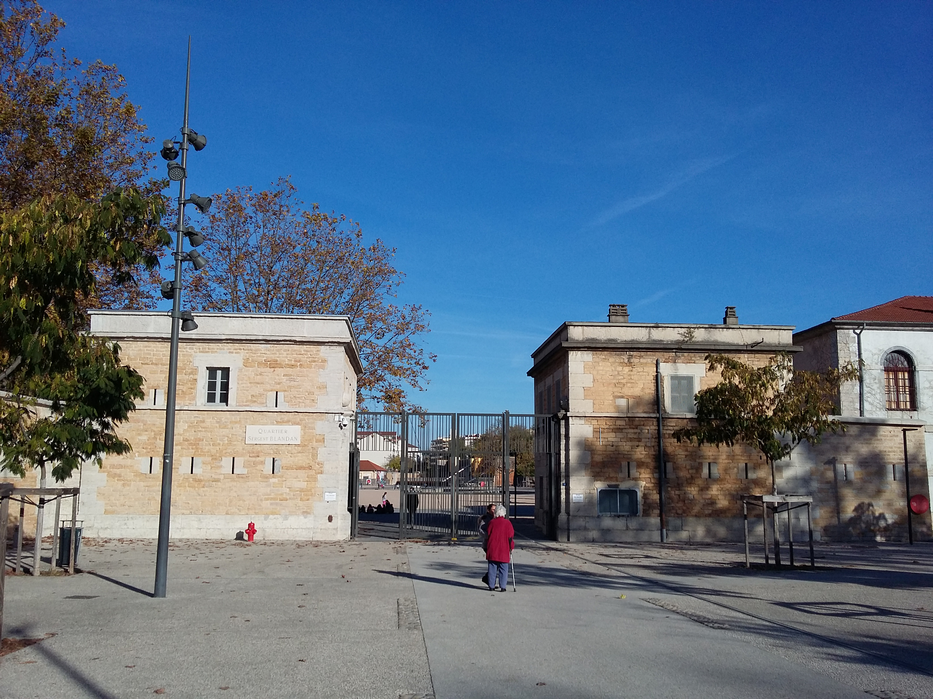 Entrée du Parc sergent Blandan à Lyon.